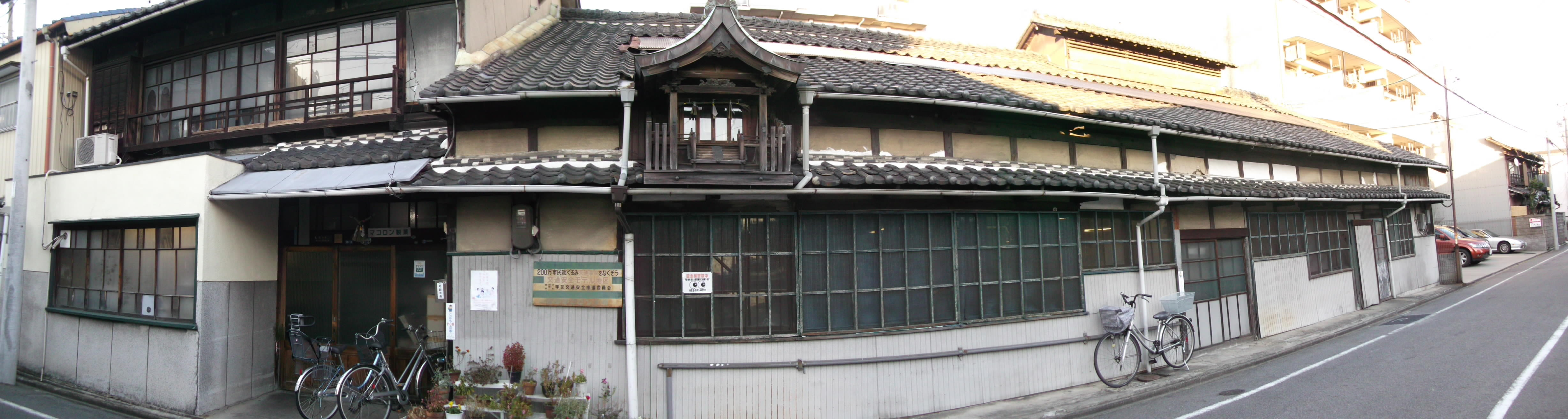 名古屋市西区栄生にあるマコロン製菓本社を南側から写す。カメラのパノラマ合成機能を使用して撮影時現地で合成